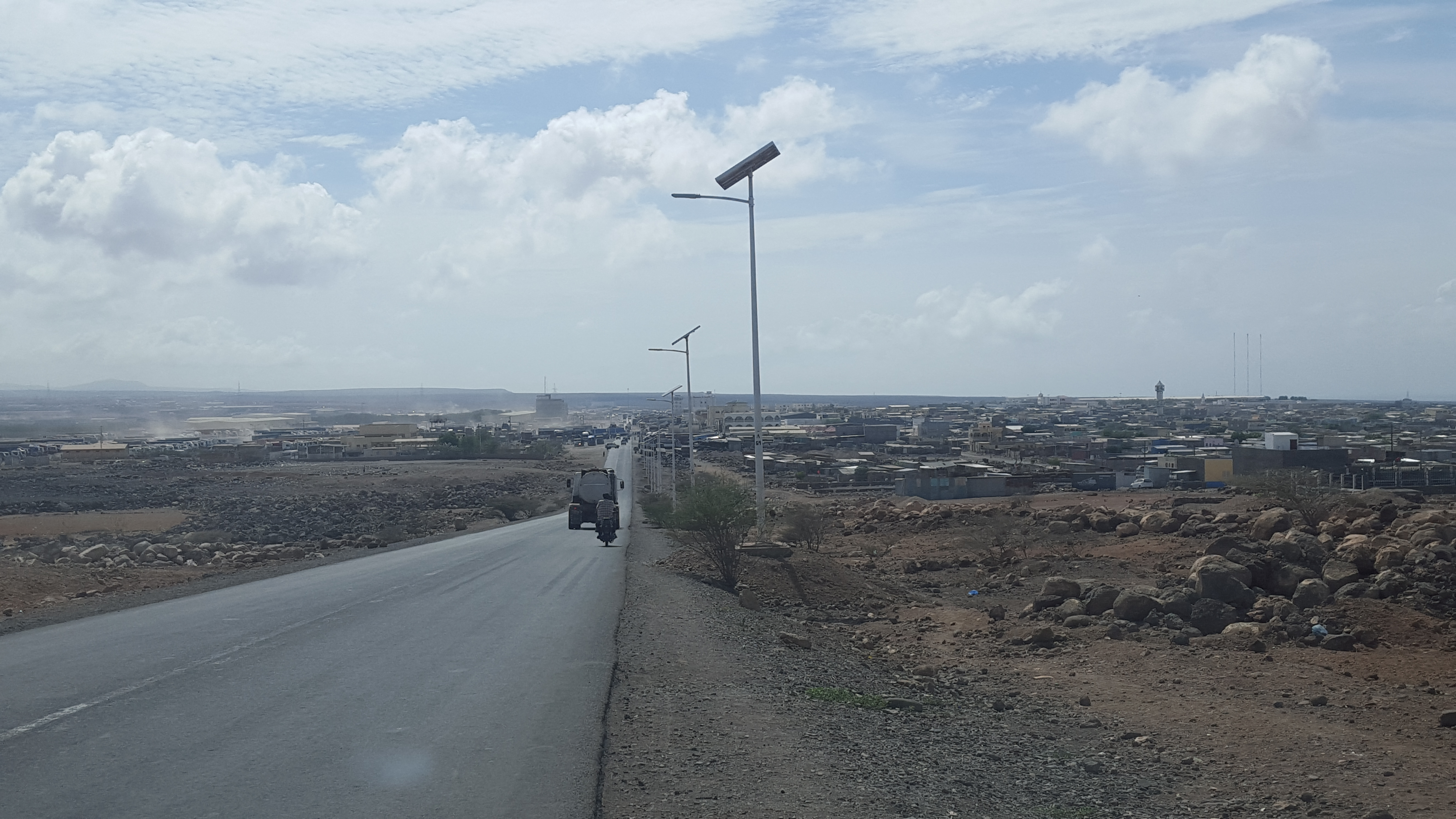 Route nationale 1 vers PK12